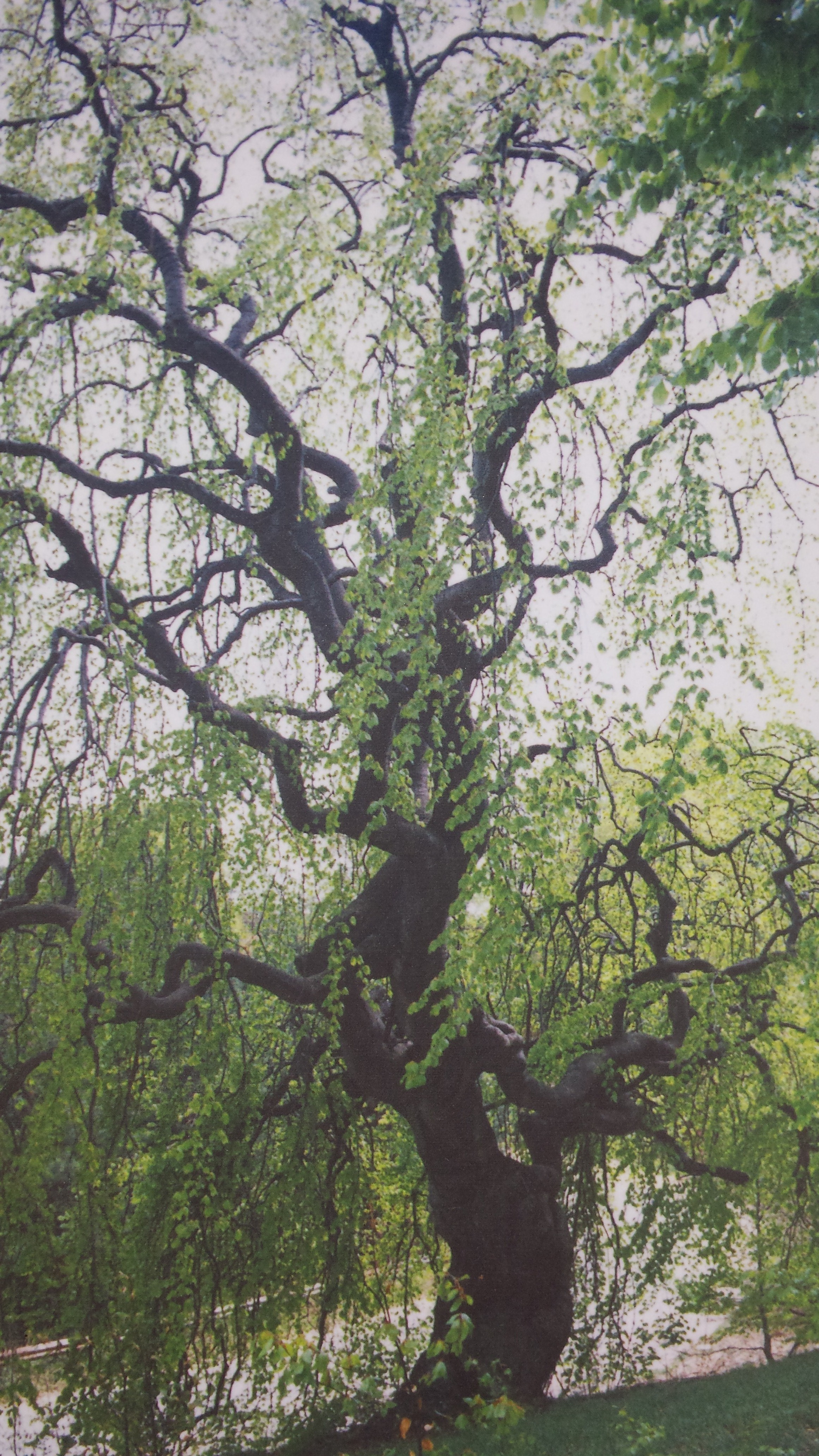 Кривото дърво